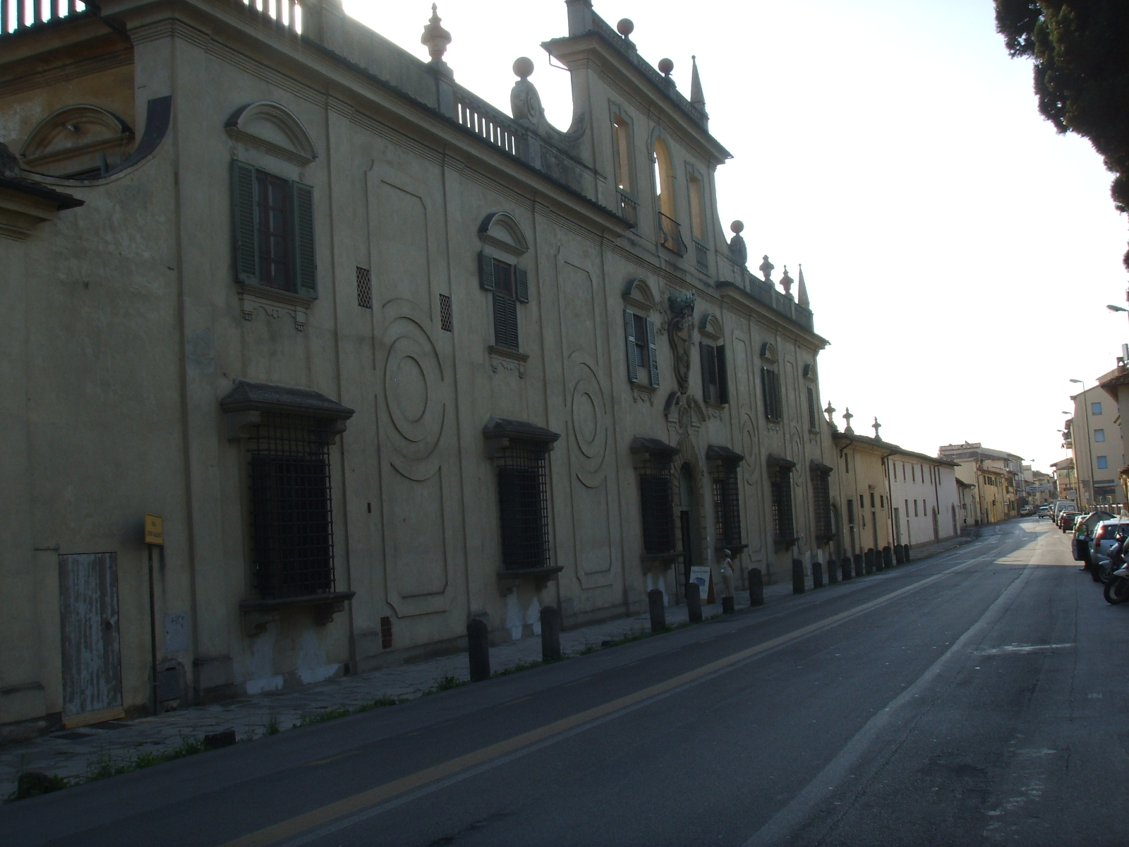 Villa guicciardini corsi salviati